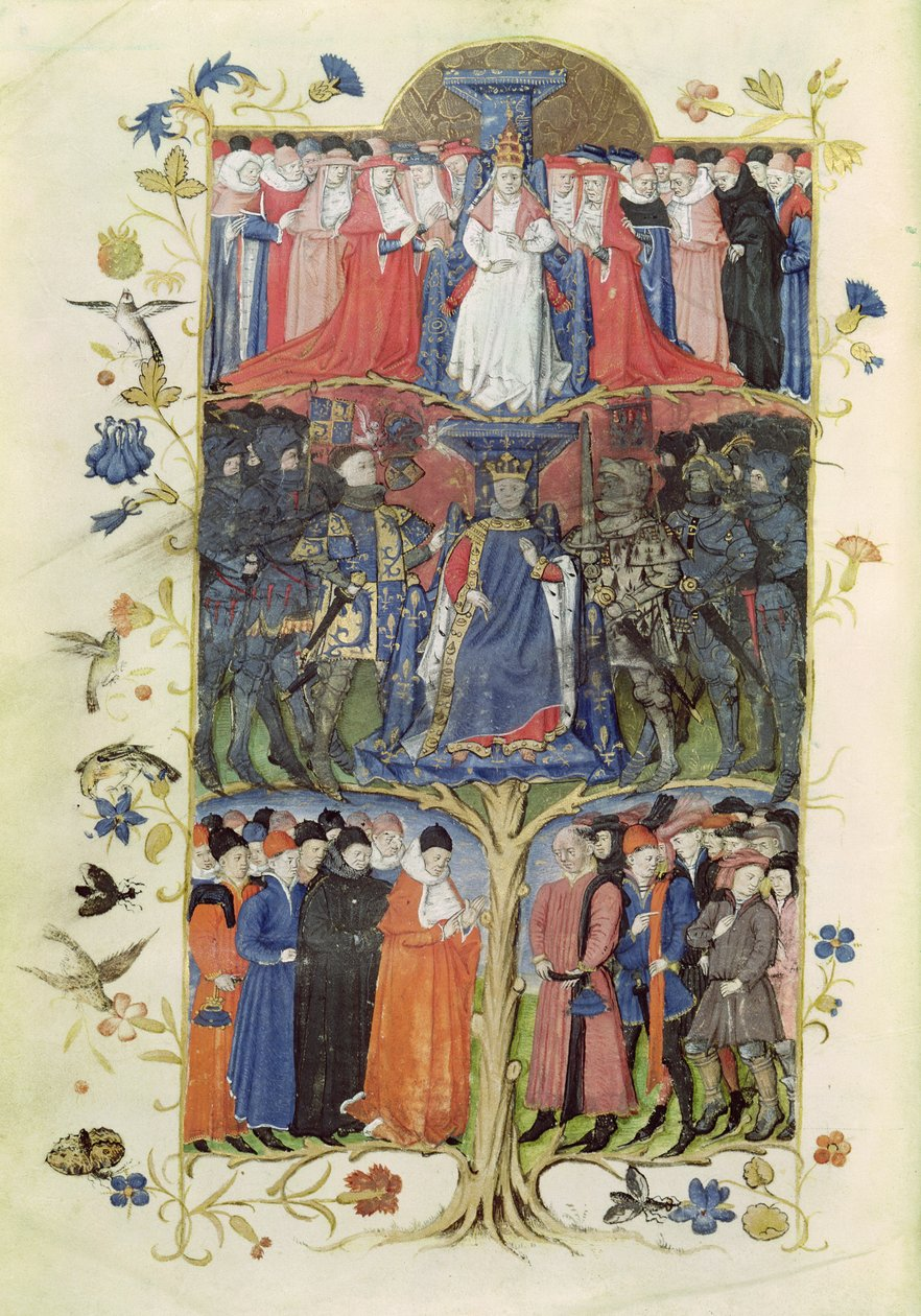 Miniature représentant les trois ordres (le clergé, la noblesse et le Tiers État) dans L'arbre des batailles de Honorat Bovet. Au centre, le roi Charles VII entouré du dauphin Louis et du connétable Arthur de Richemont. Paris, BnF, Bibliothèque de l'Arsenal, ms. 2695 folio 6v.